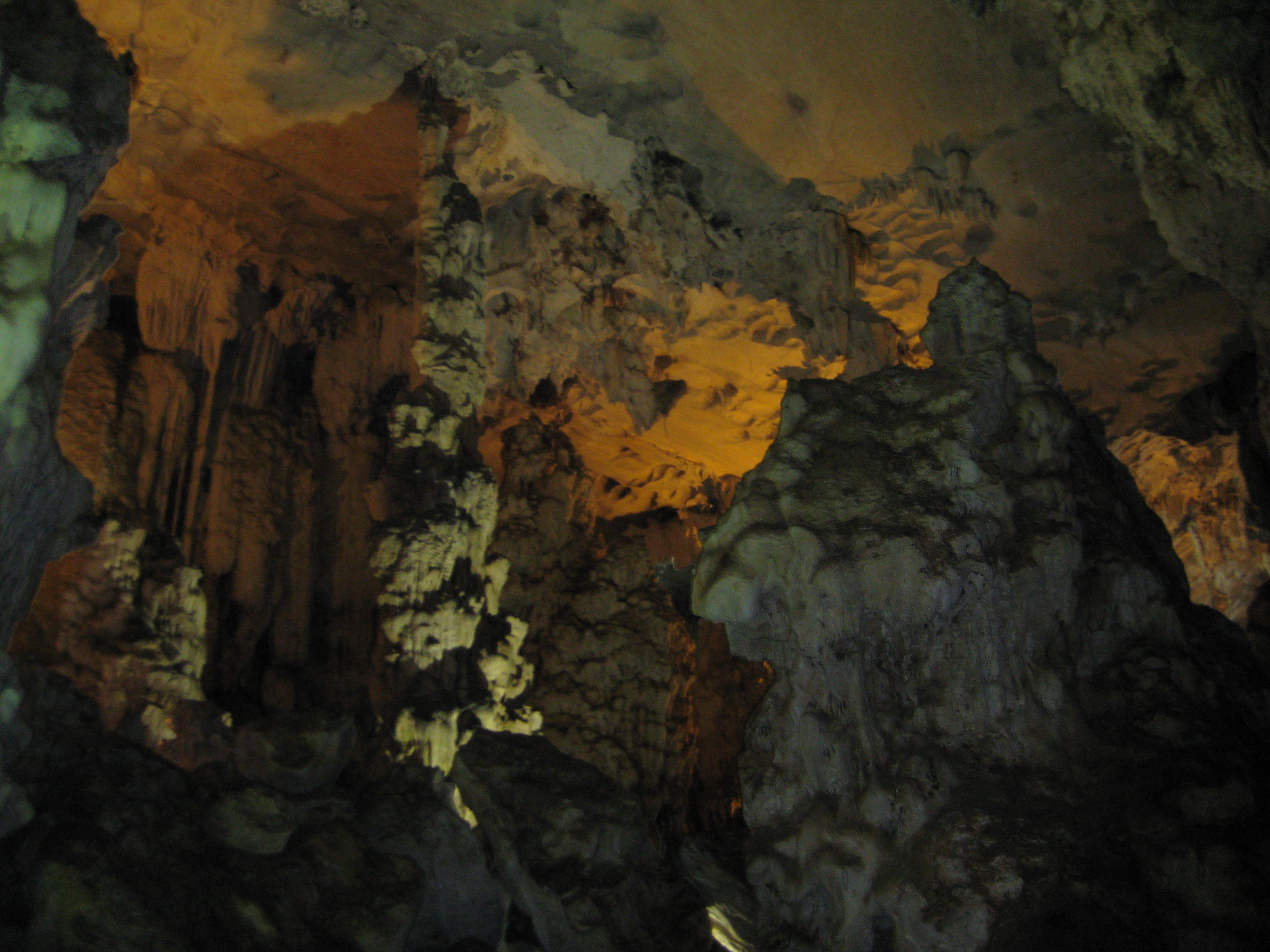 nhũ đá lấp lánh ở động Vân Trình thuộc tỉnh Ninh Bình